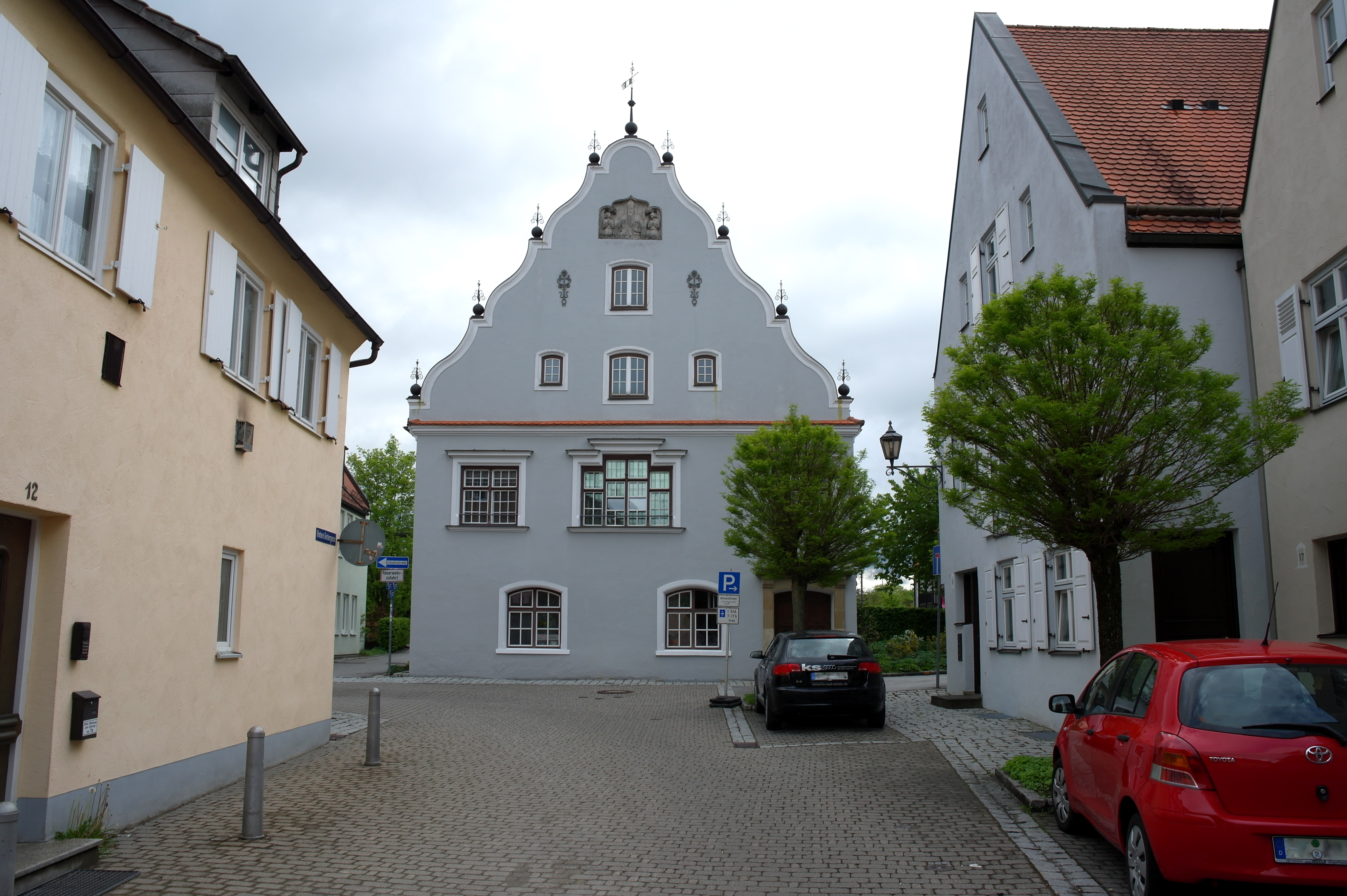 Wohnhaus und Werkstatt des Memminger Kunstschreiners und Bildhauers Leonhard Vogt. Im Kern 1421, 1870 Neugestaltung der Fassade im Stil der Neurenaissance (Ansicht von Westen).